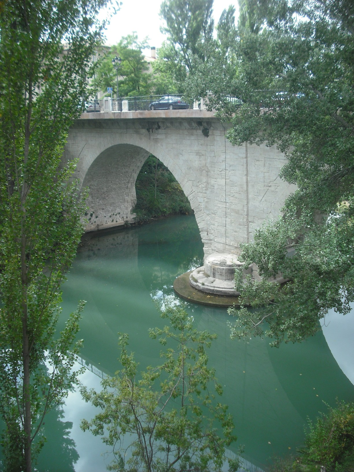 Puente de San Antón.